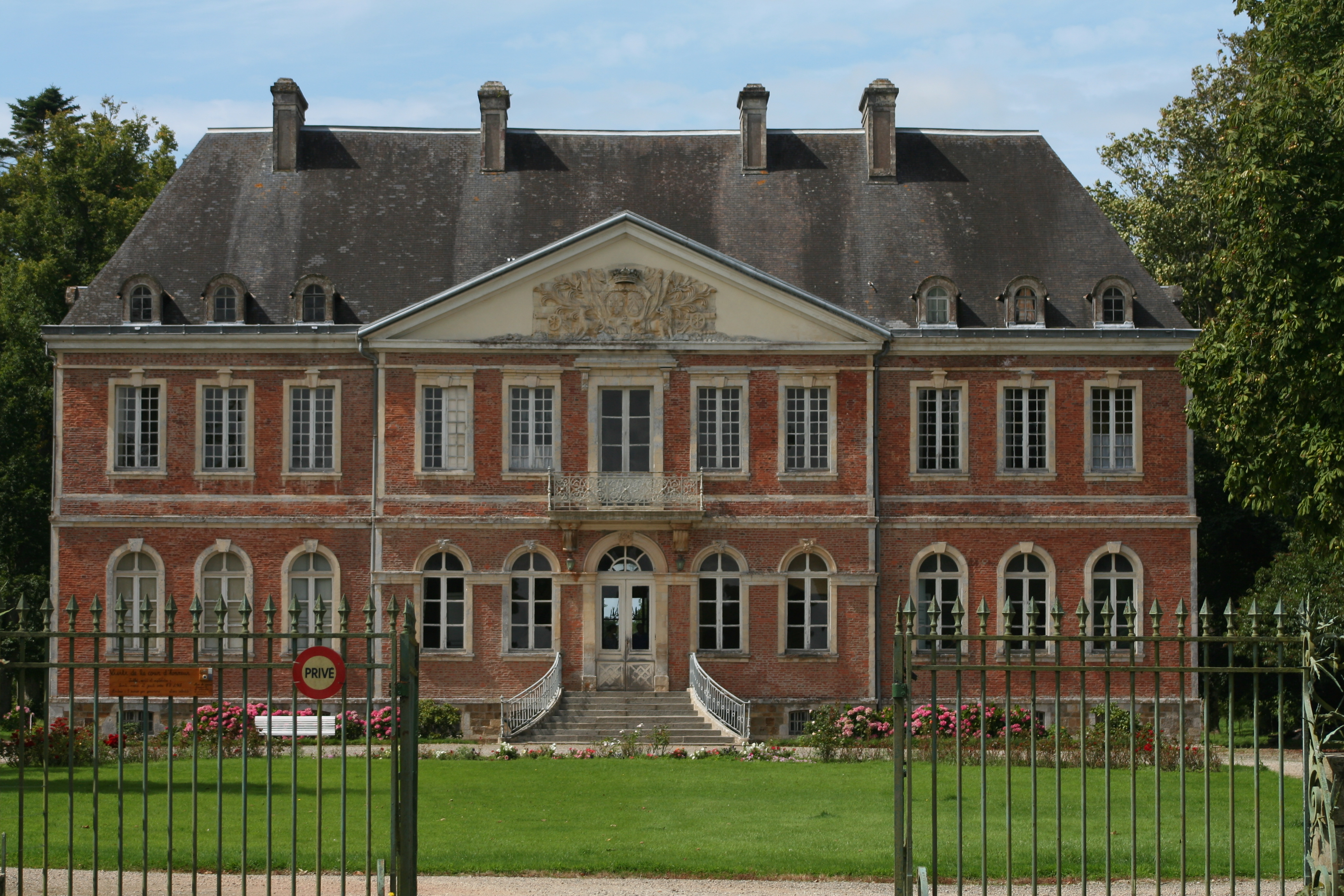 La facade du Chateau de Sainte-Suzanne